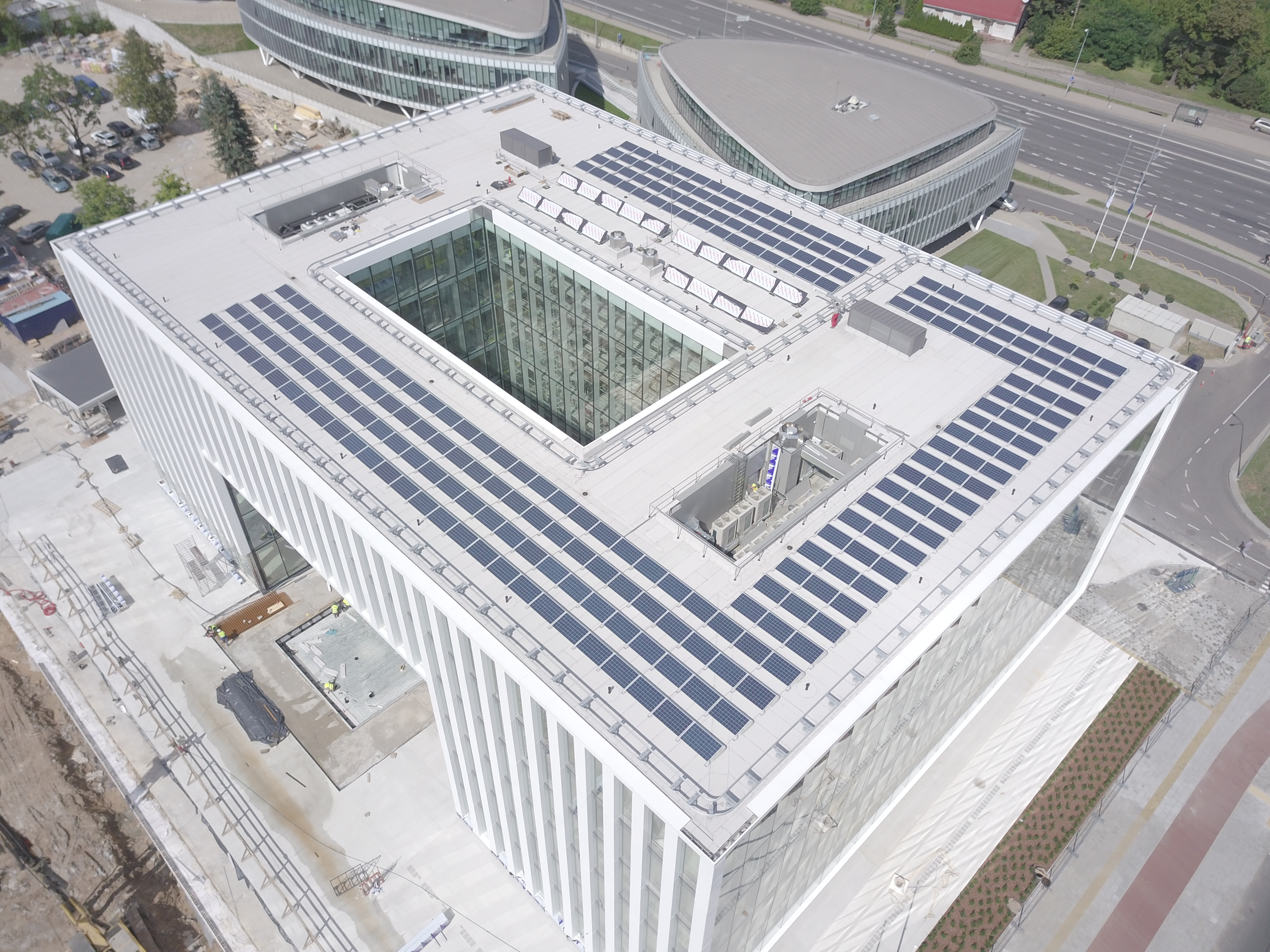 Saulės elektrinės ant biurų komplekso sostinės Saltoniškių gatvėje stogų.